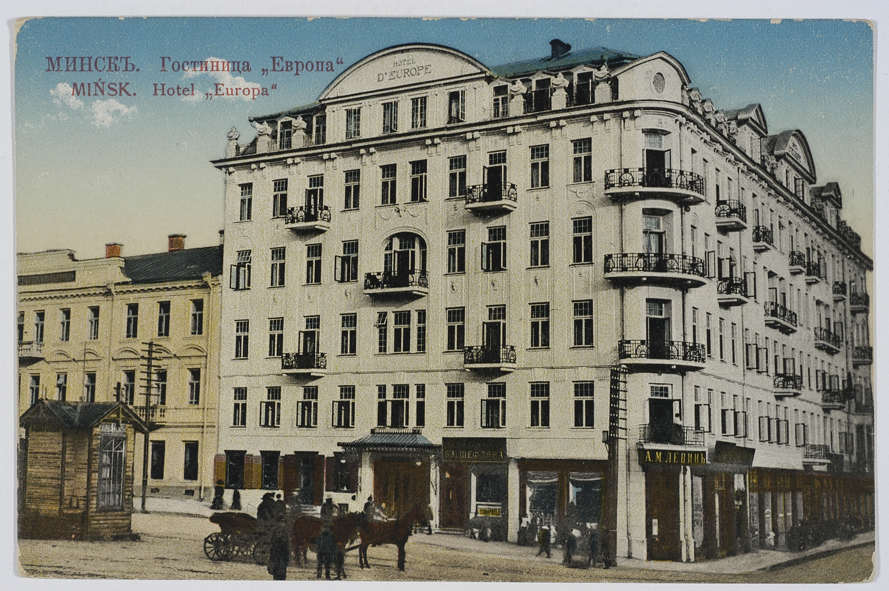 Беларуская (тарашкевіца): Менск (Miensk), гатэль Эўропа (Eŭropa) і пачатак вуліцы Францішканскай